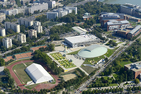 Légi fotó a budapesti Tüskecsarnokról